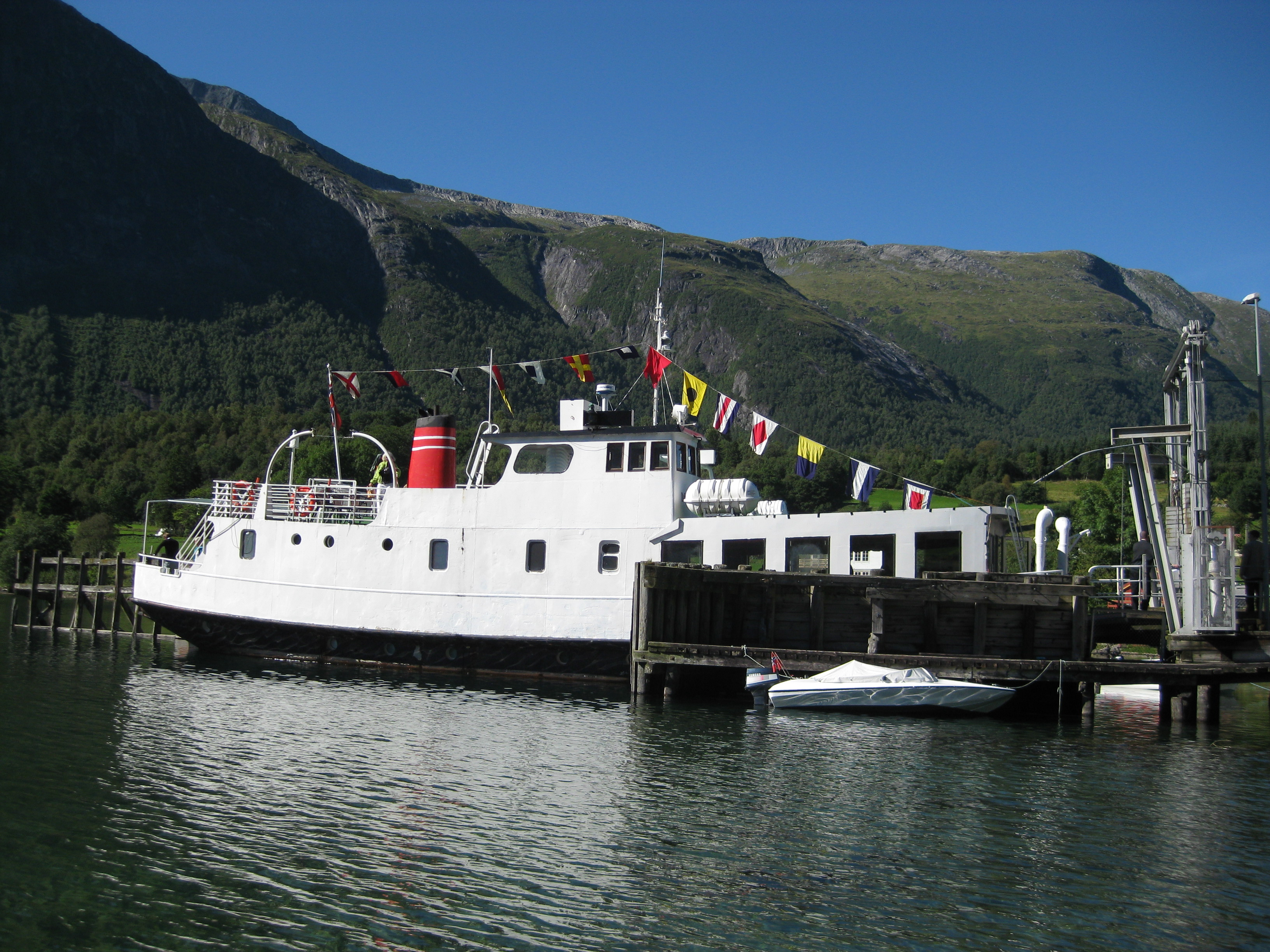 MF «Mardøla» er en bilferge bygget i 1959 som MF «Volda» for Møre og Romsdal Fylkesbåtar. Øverås ferjekai ved Eikesdalsvannet.